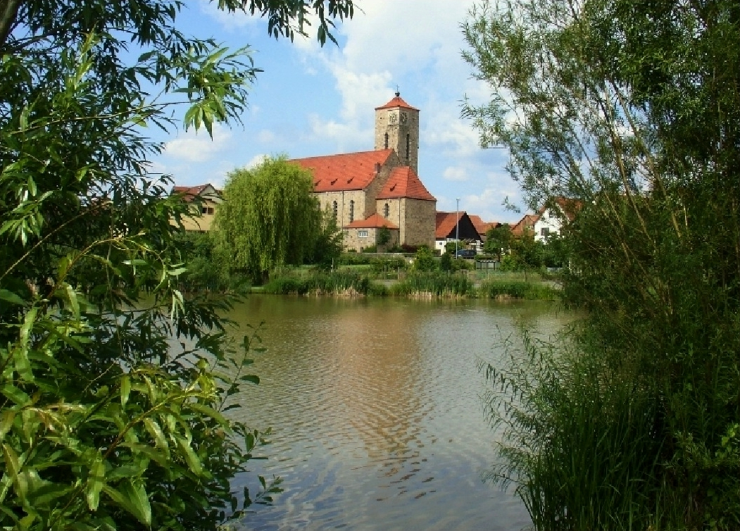 Die Kirche von Hohenroth bei Bad Neustadt (3 km) an der Saale. Die Kirche ist mitten im Ort an einem kleinen See gelegen.